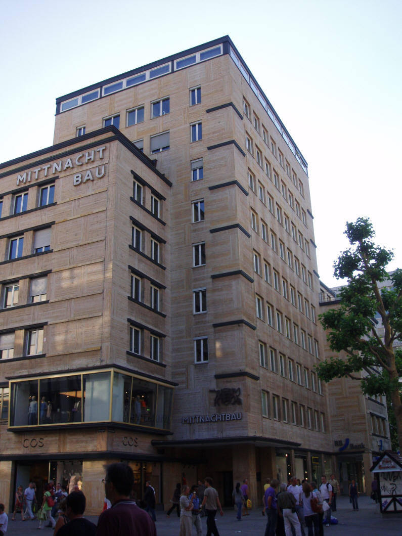 Mittnachtbau in Stuttgart, Königstr.